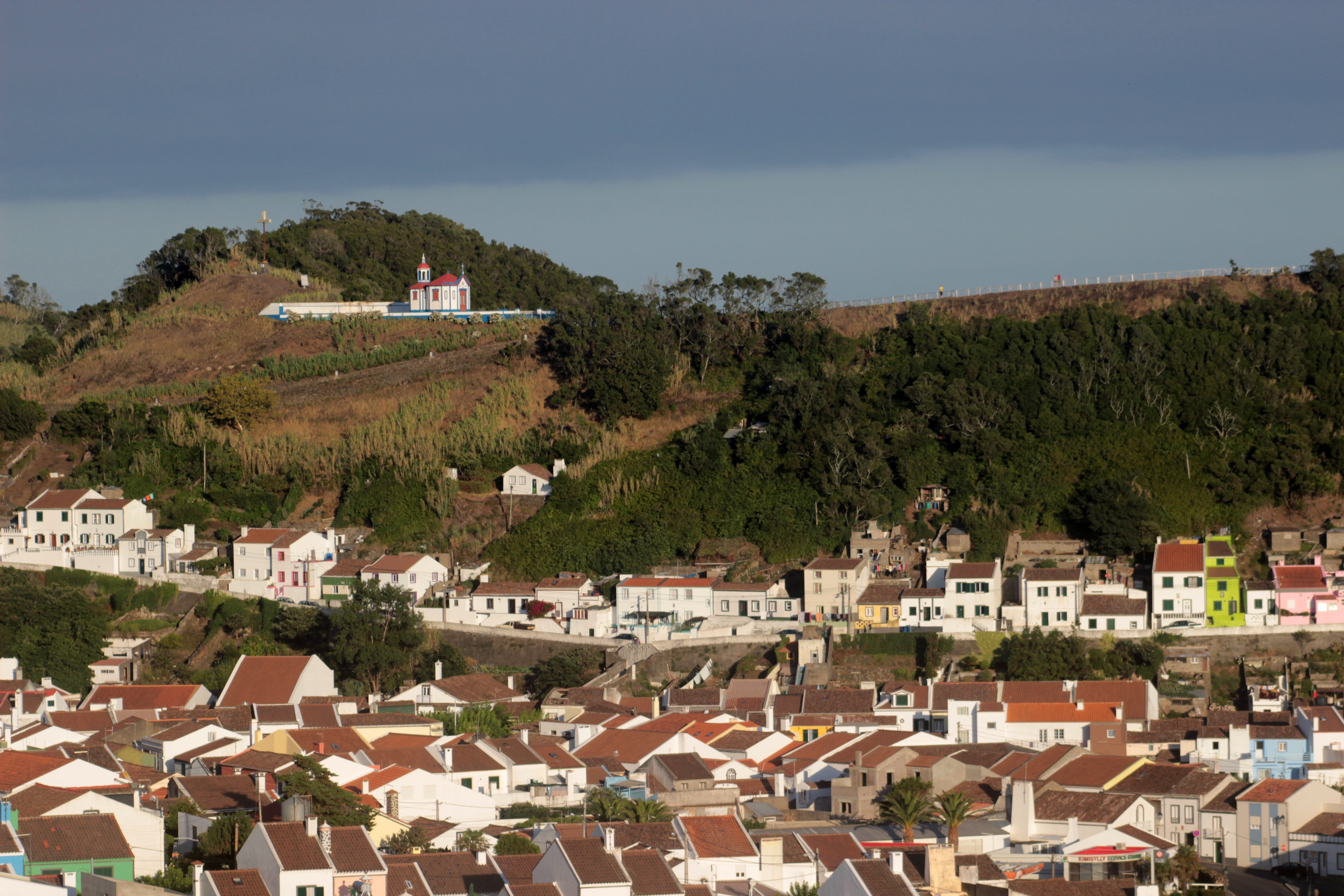 Água de Pau